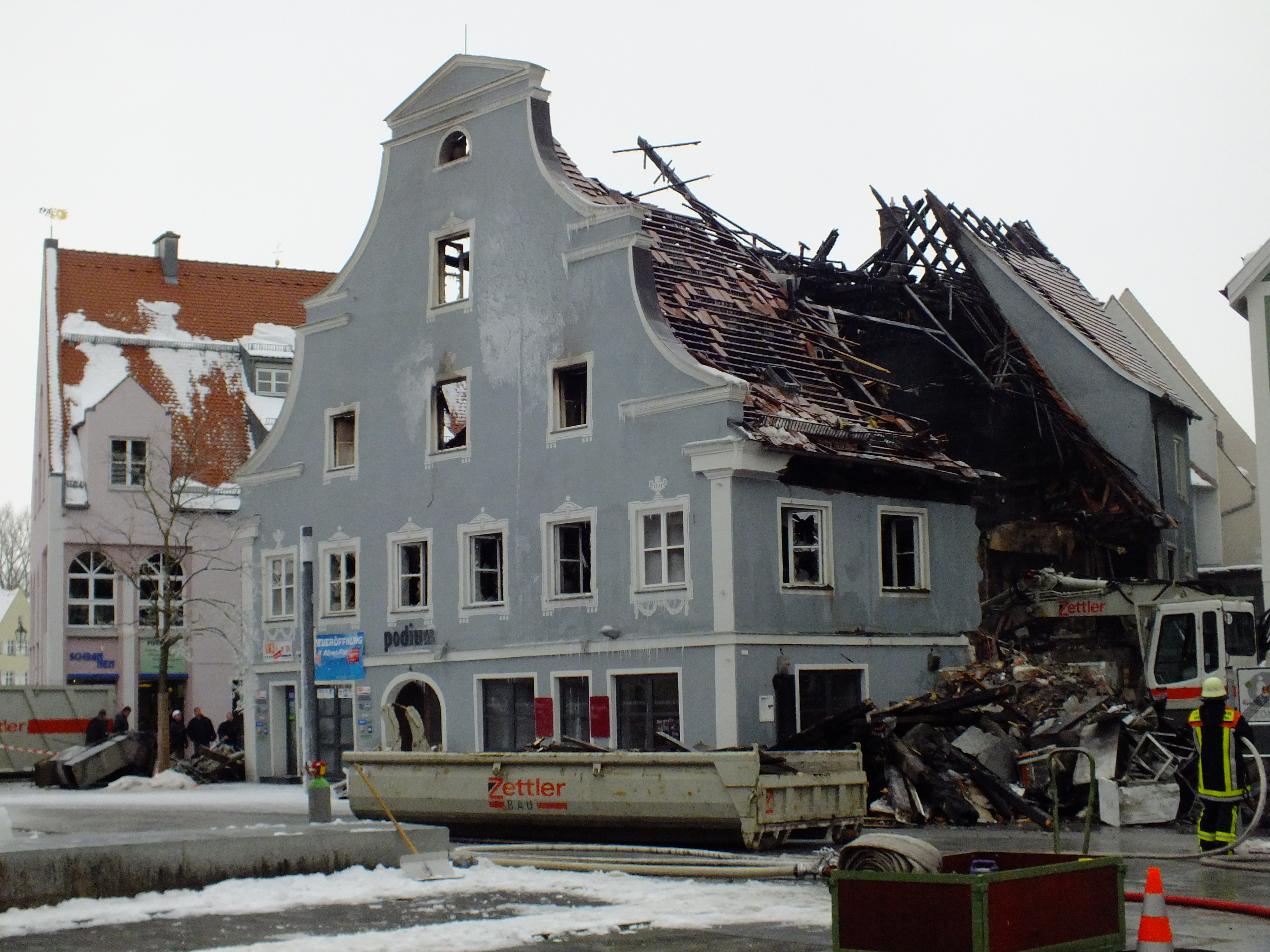 Gasthaus zum Raben in Memmingen, Brand am 23. Januar 2013, zweiter Löschtag am 24. Januar 2013